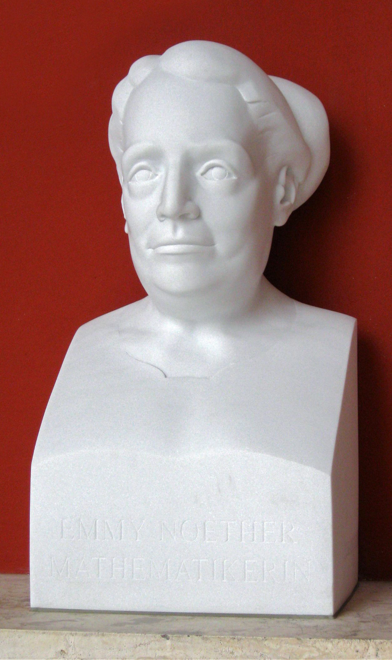 Ruhmeshalle München: Emmy Noether Mathematikerin (im Jahre 2009 neu aufgestellt)